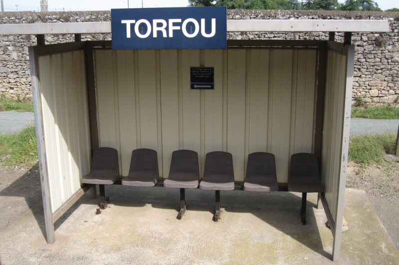 L'abri de quai de l'arrêt de Torfou